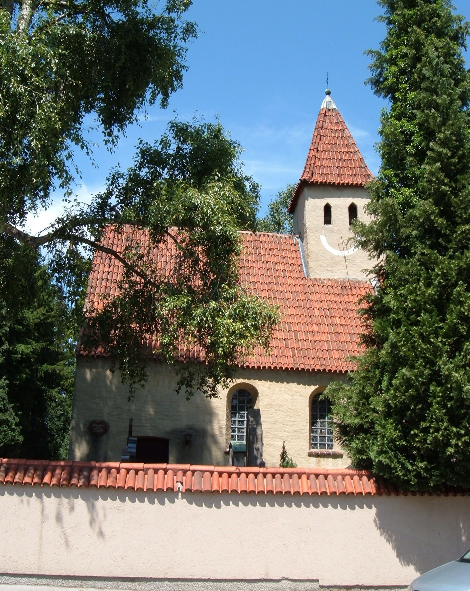 Kirche in Englschalking